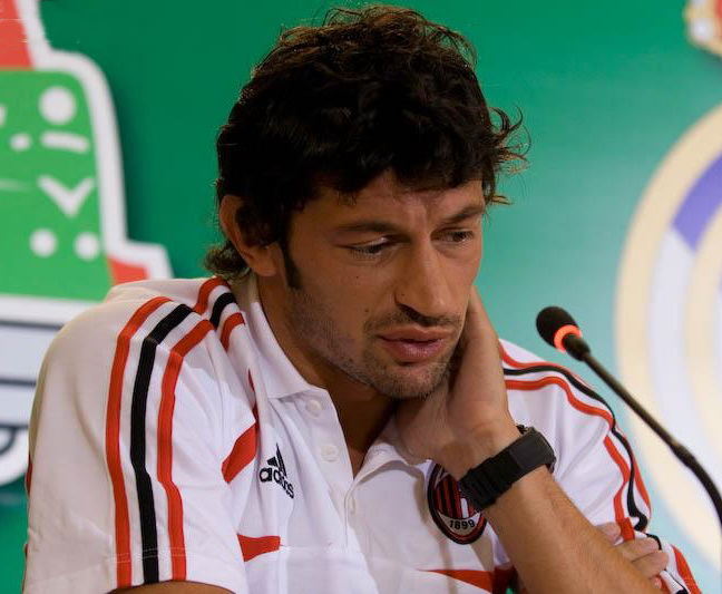 Kakhaber Kaladze